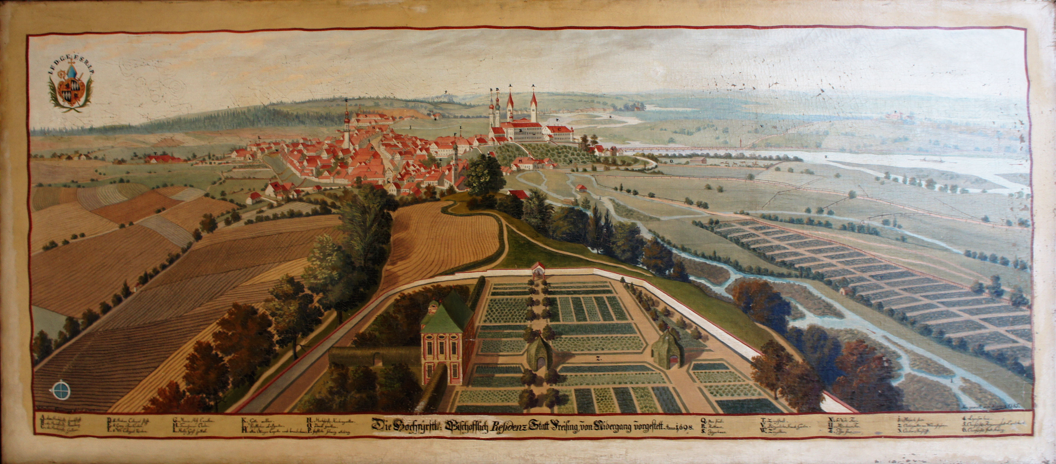 Gemälde aus einer Serie mit Darstellungen von Besitztümern des Hochstifts Freising im Fürstengang zwischen Fürstbischöflicher Residenz und Freisinger Dom.